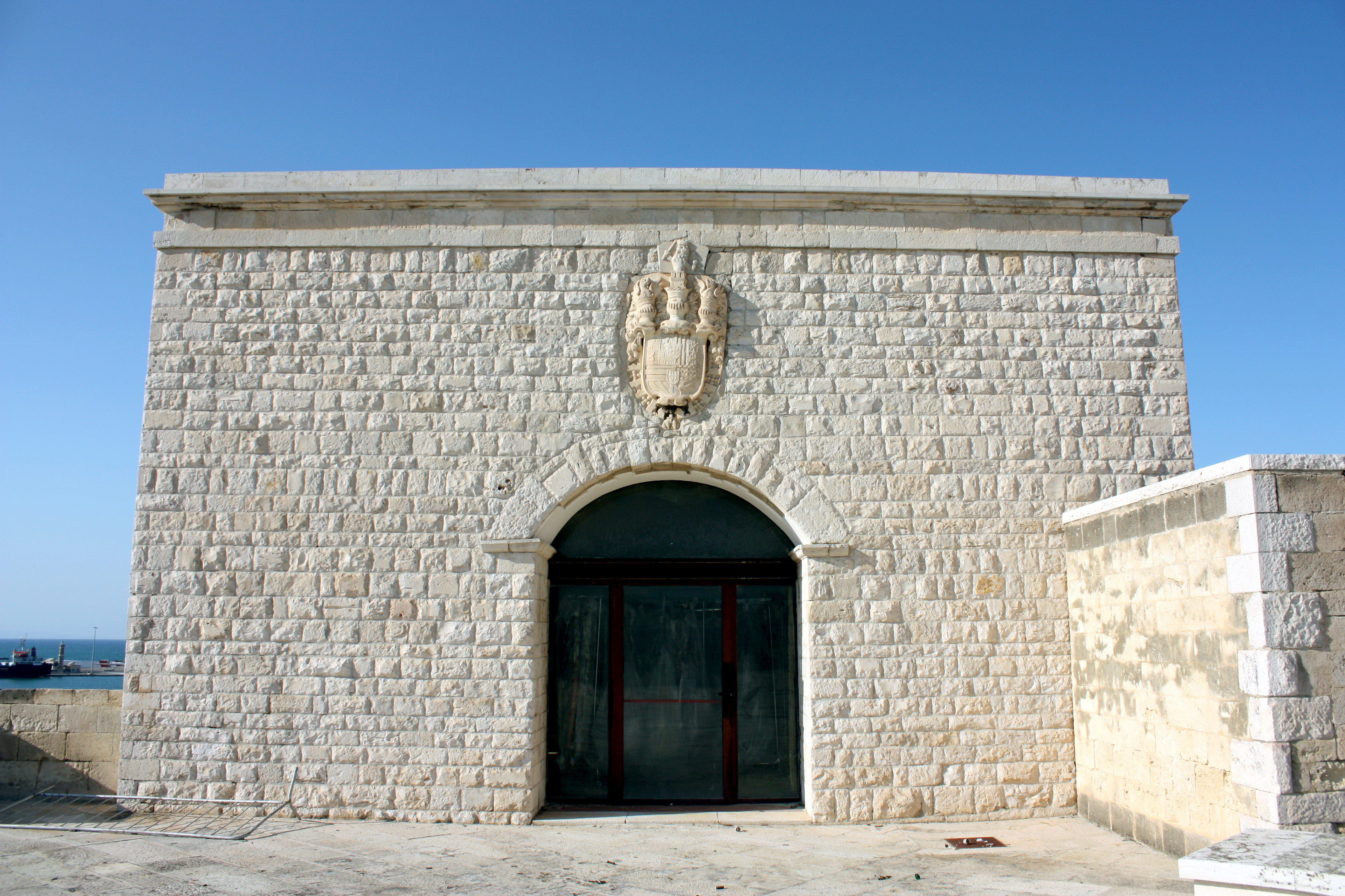 Castello di Barletta - Laboratorio degli Artificieri. Fronte principale